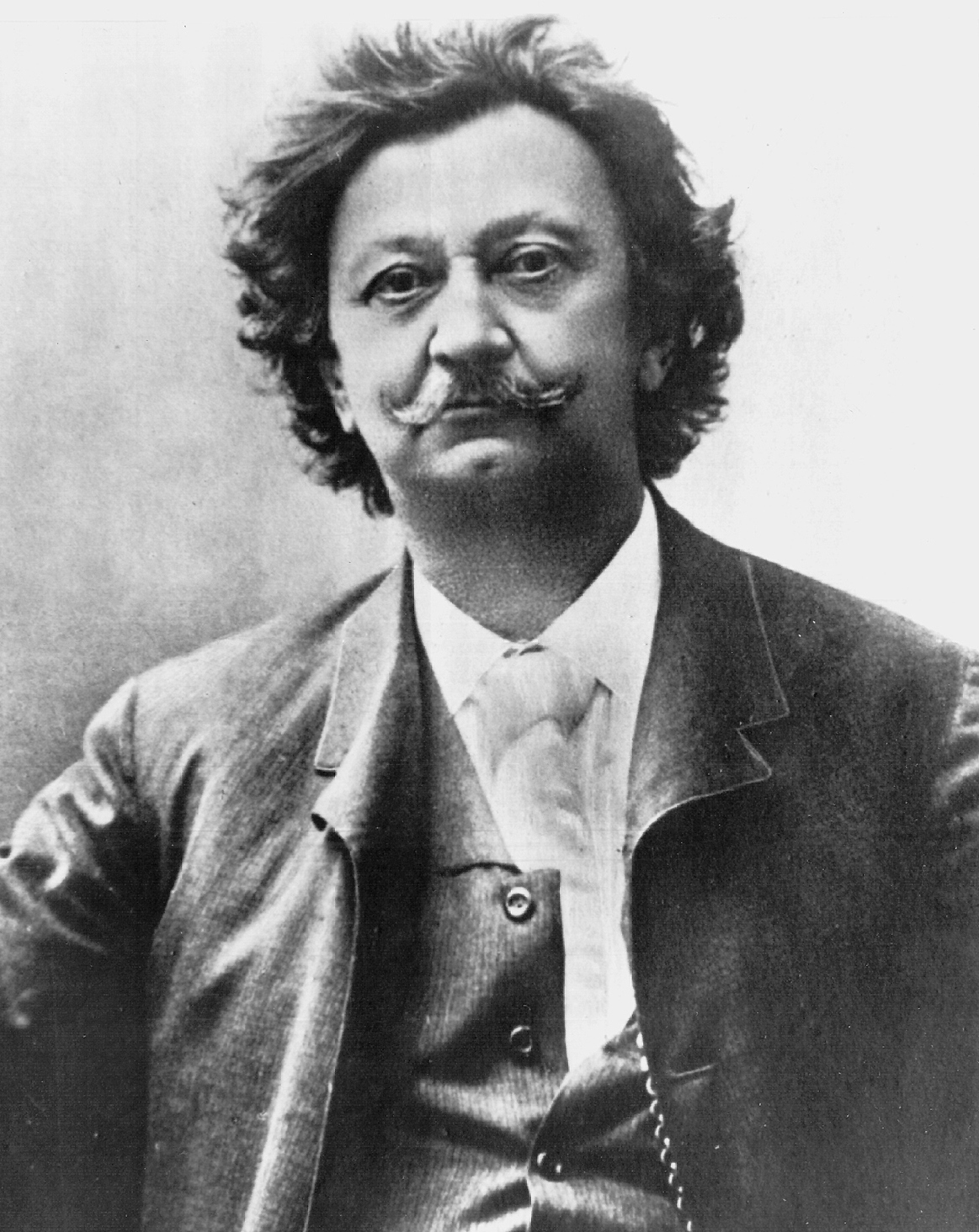 Laza Kostić (1841-1910)